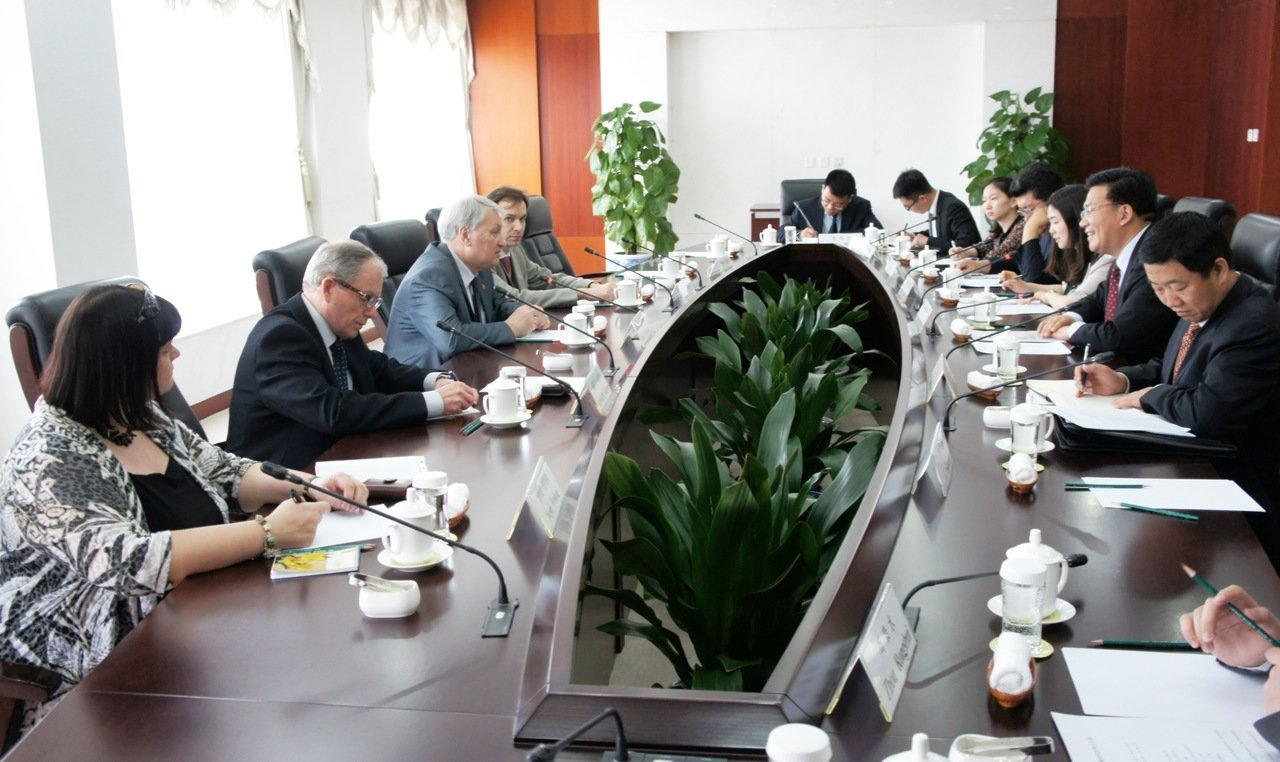 Переговоры с иностранной делегацией